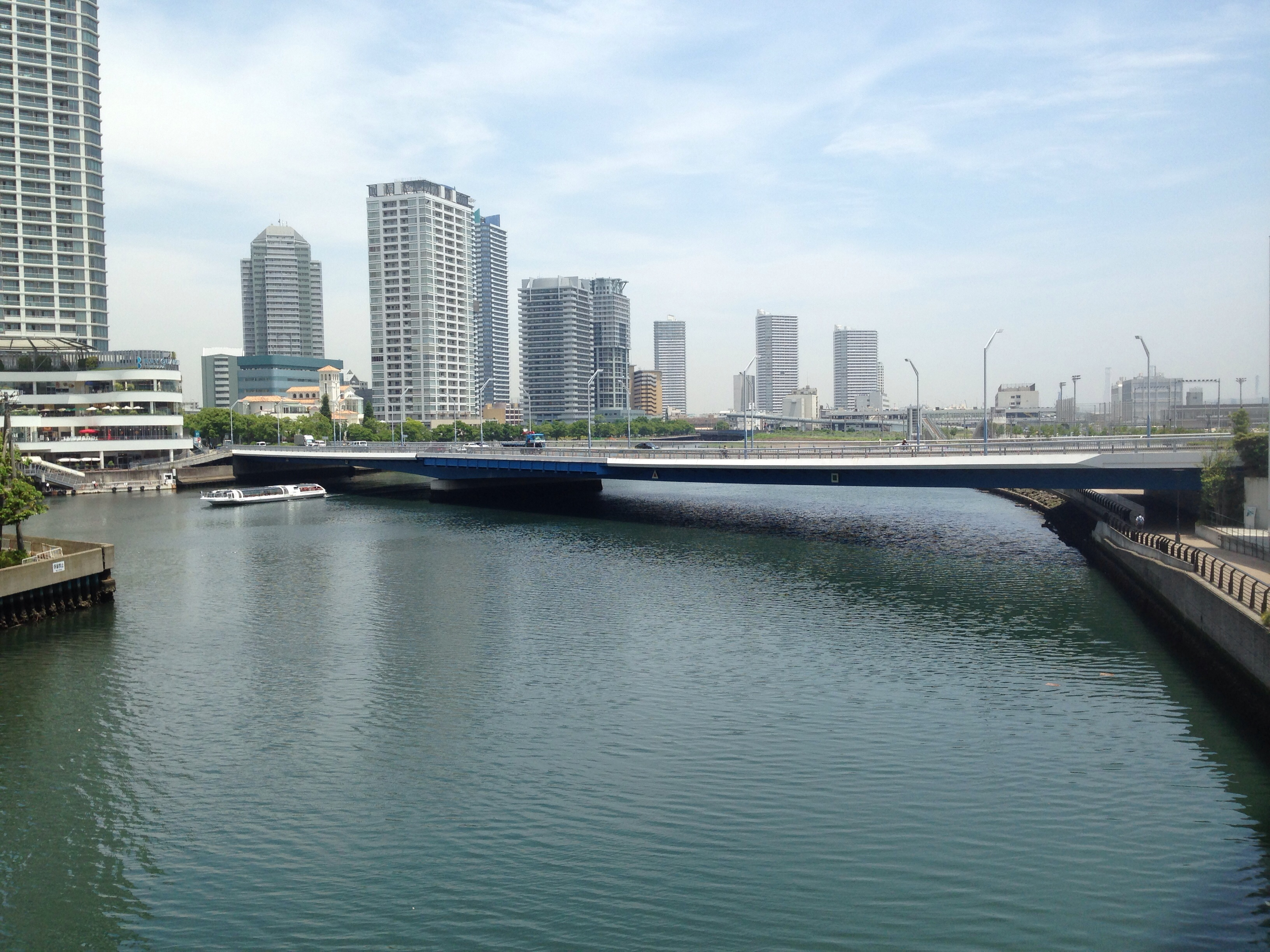 みなとみらい大橋全景をはまみらいウォークより撮影。左の方の橋下を通っているのは海上交通「シーバス」。